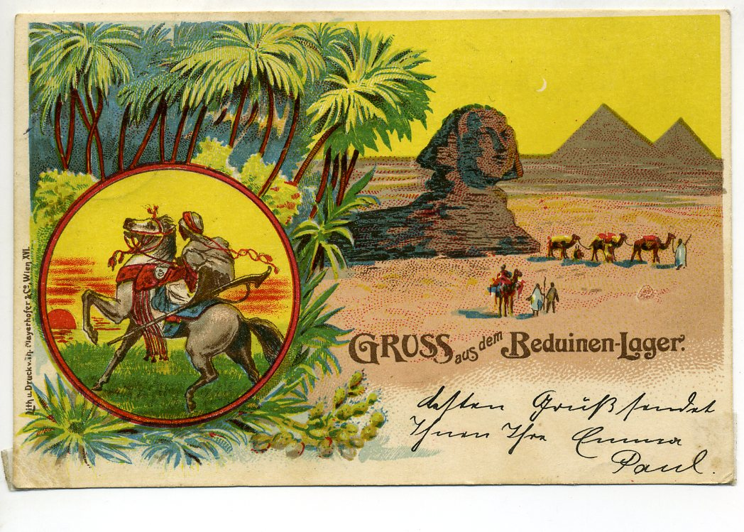 Gruss aus dem Beduinen-Lager